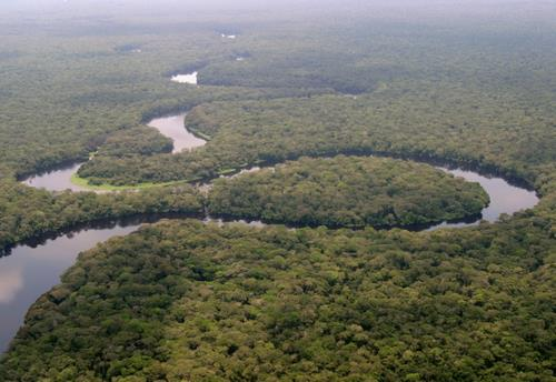 Parc national de la Salonga en 2005.